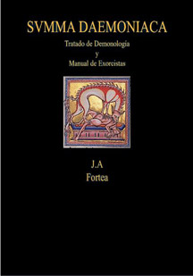 Libro Summa Daemoniaca, autor José Antonio Fortea Cucurull.